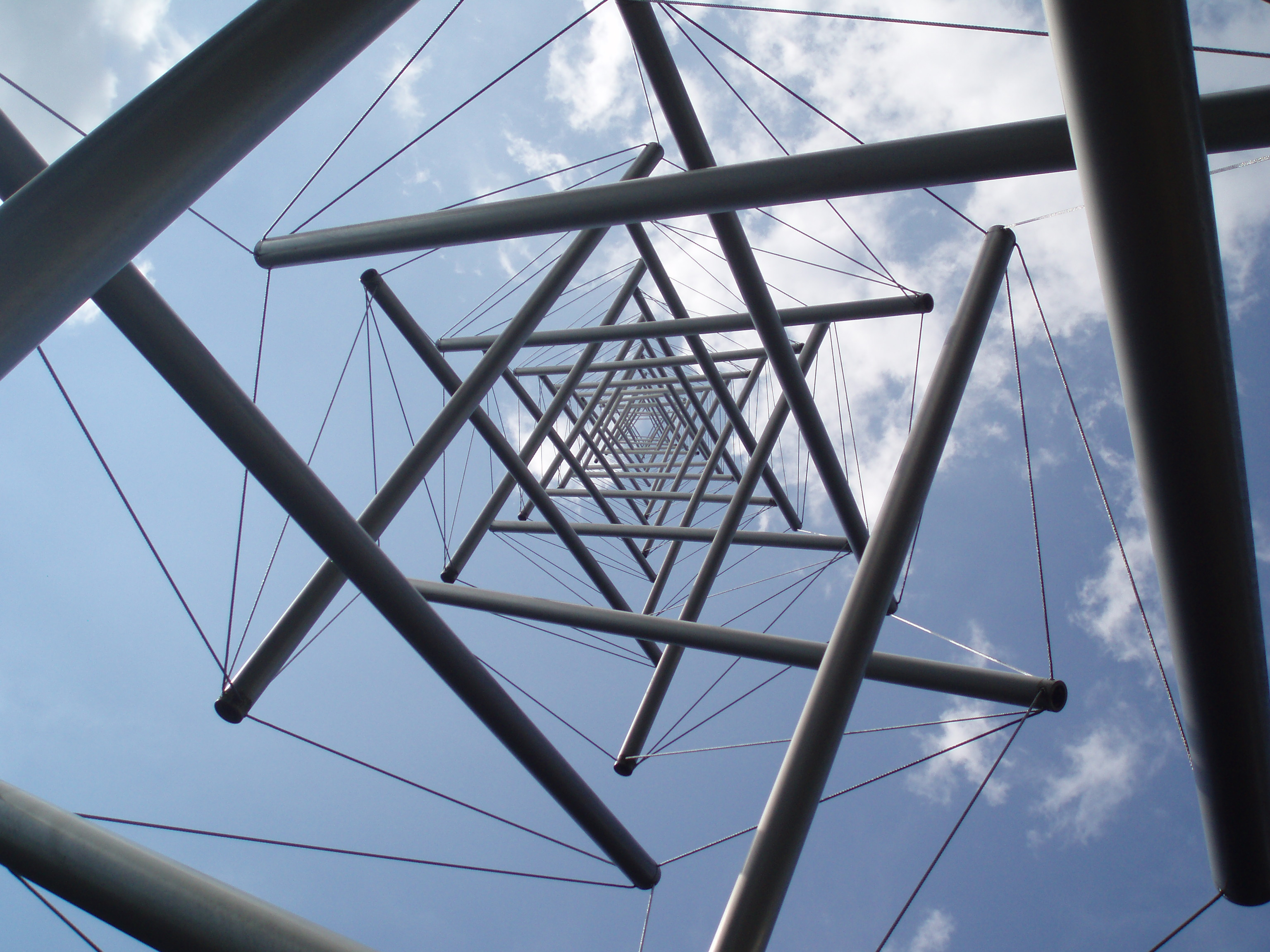 Needle Tower II van Kenneth Snelson in de beeldentuin van het Kröller-Müller Museum in het Nationaal Park De Hoge Veluwe. Gemaakt in 1969 van aluminum en roestvrij staal. 90 x 18 x 18 feet, 30 x 6 x 6m. The Netherlands.